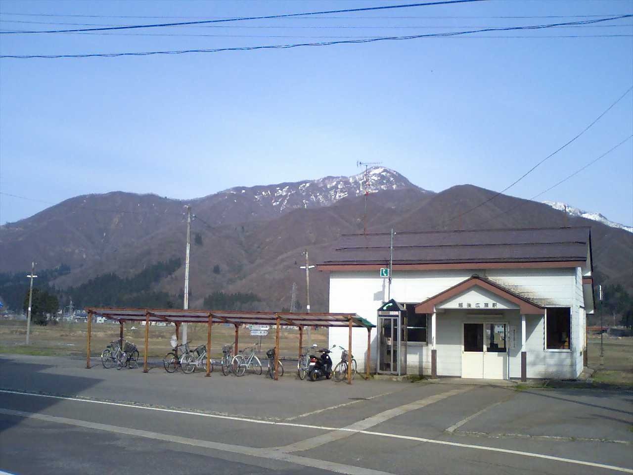 この画像は投稿者によって新潟県魚沼市並柳にて撮影された越後広瀬駅駅舎と駐輪場の写真。背景の山は下権現堂山。